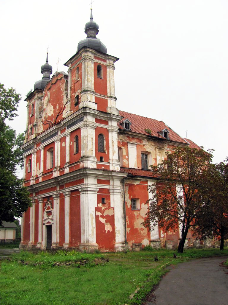 Костел св.Іоана Хрестителя